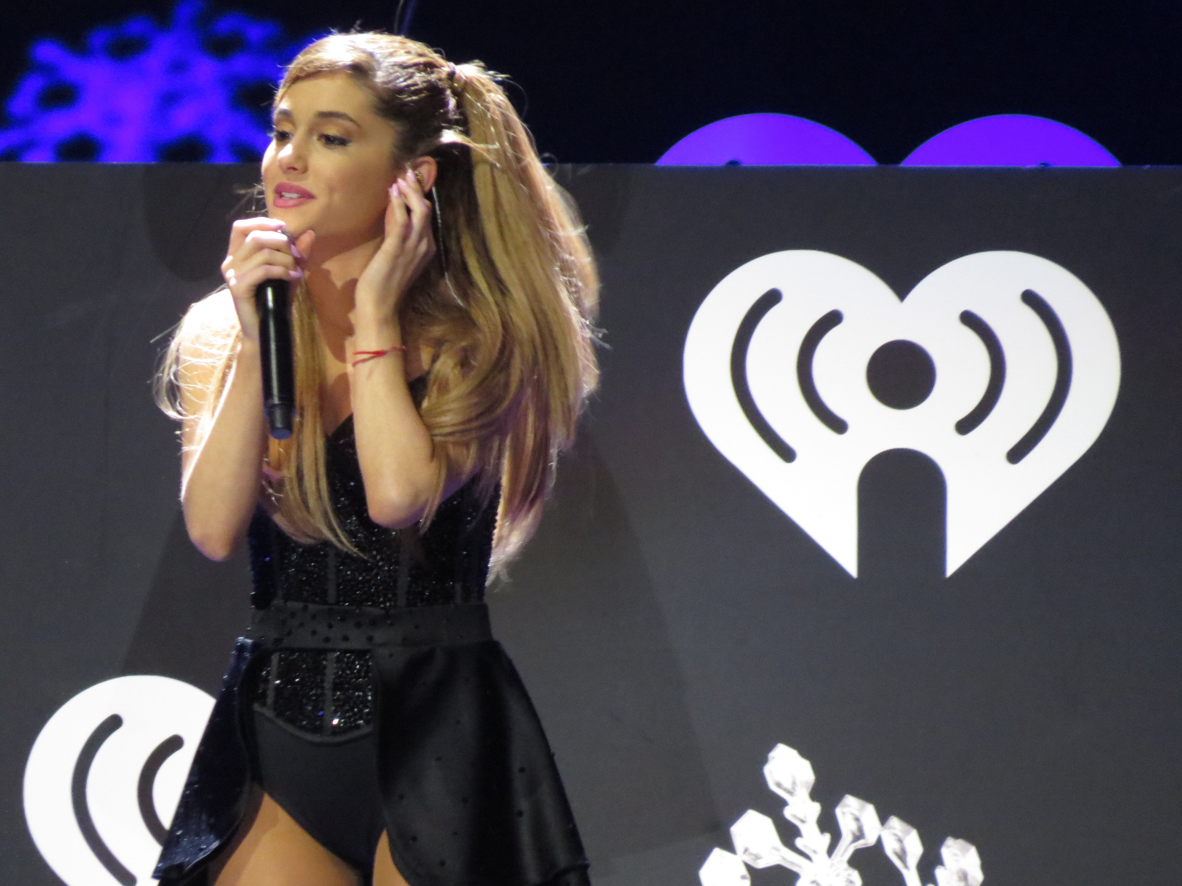 Ariana Grande